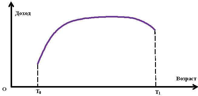 Профиль доход-возраст (Рощина Я.М. Основы моделирования экономического поведения домохозяйств, М.:ВШЭ, 2015 - стр 99